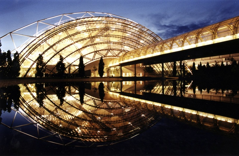 Foire de Leipzig, La struttura di notte